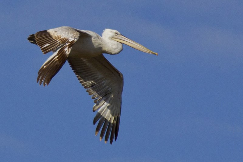 Кудрявый пеликан на озере Курлады (Челябинская область)